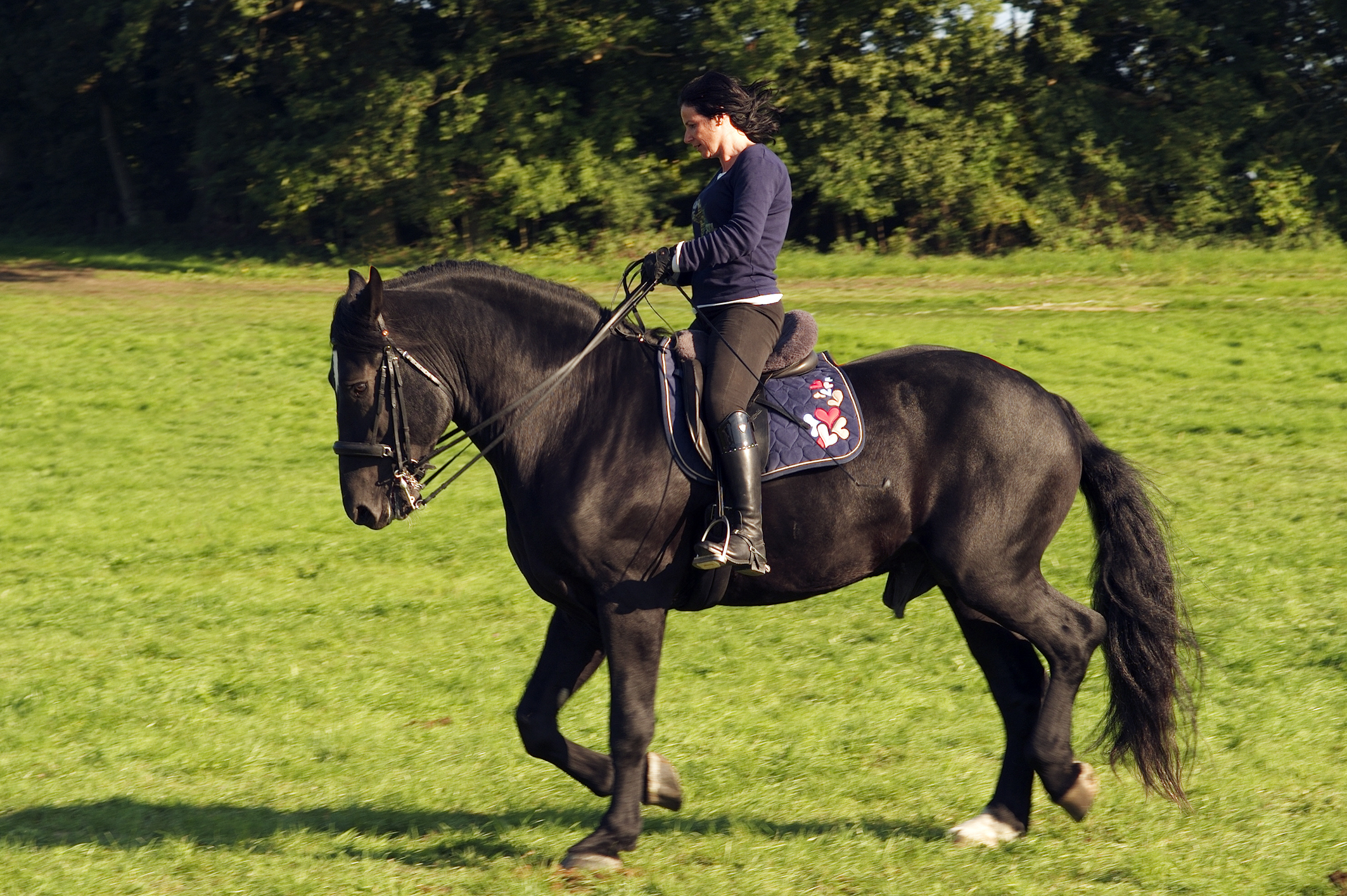 INRA, JEan Weber